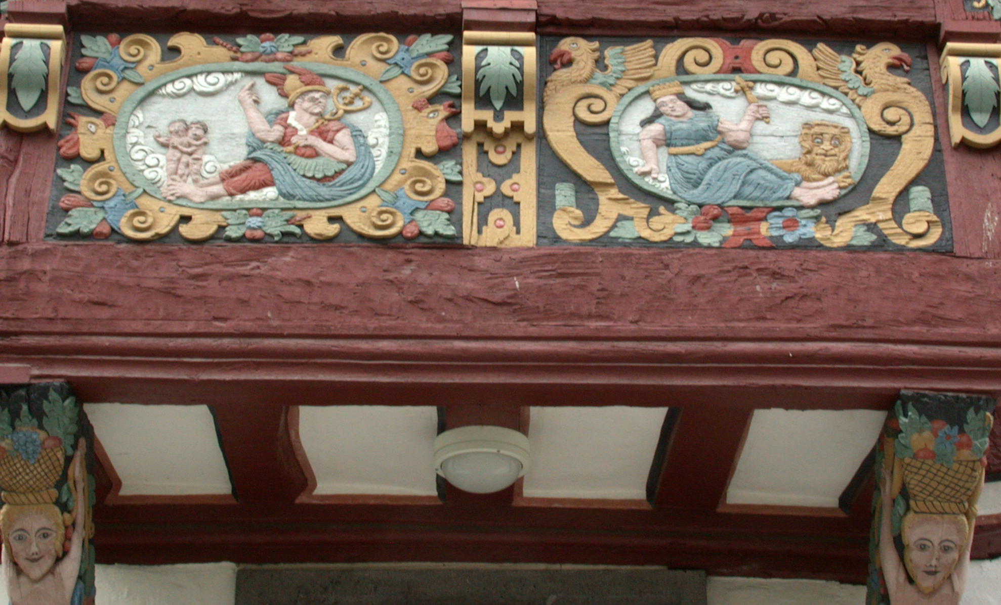 Detail des Schnitzwerks am Amthof, Bad Camberg, Deutschland